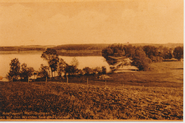 Ausflugsort Matzutkehmen mit Blick auf den Wystiter See und Litauen